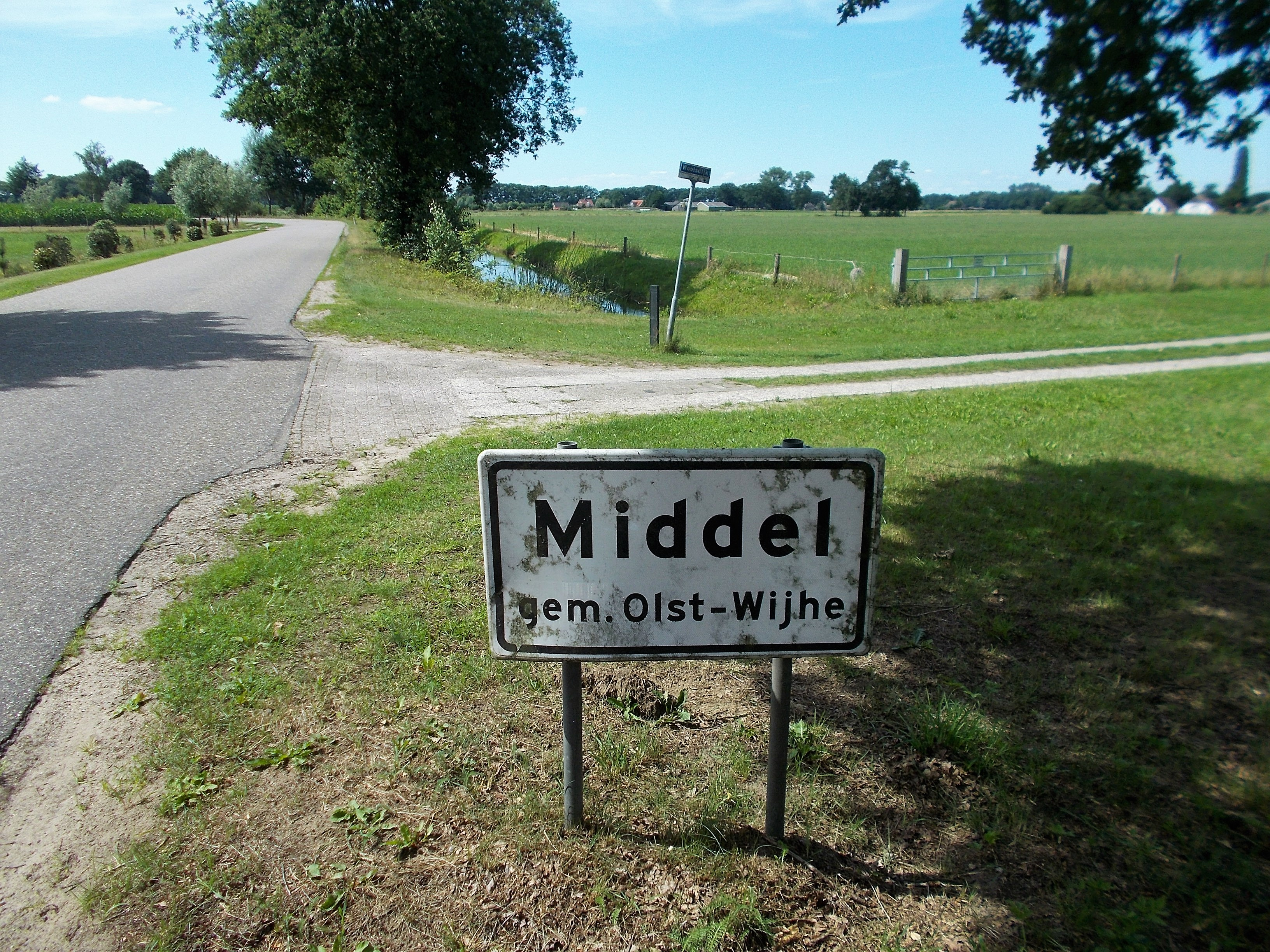 zie boven